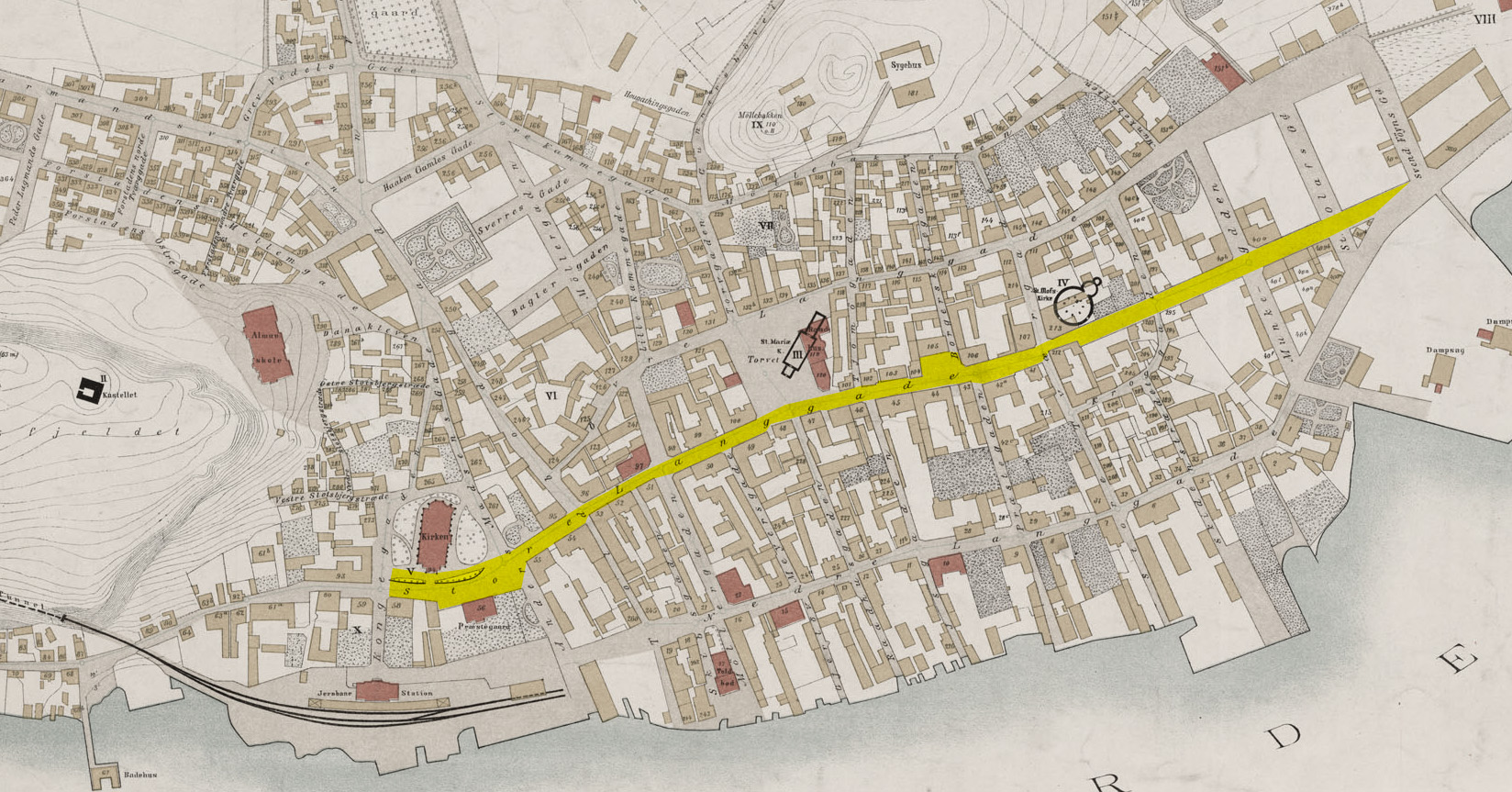 Utsnitt av kart fra 1883 over Tønsberg sentrum. Store Langgade (Storgaten) avmerket.